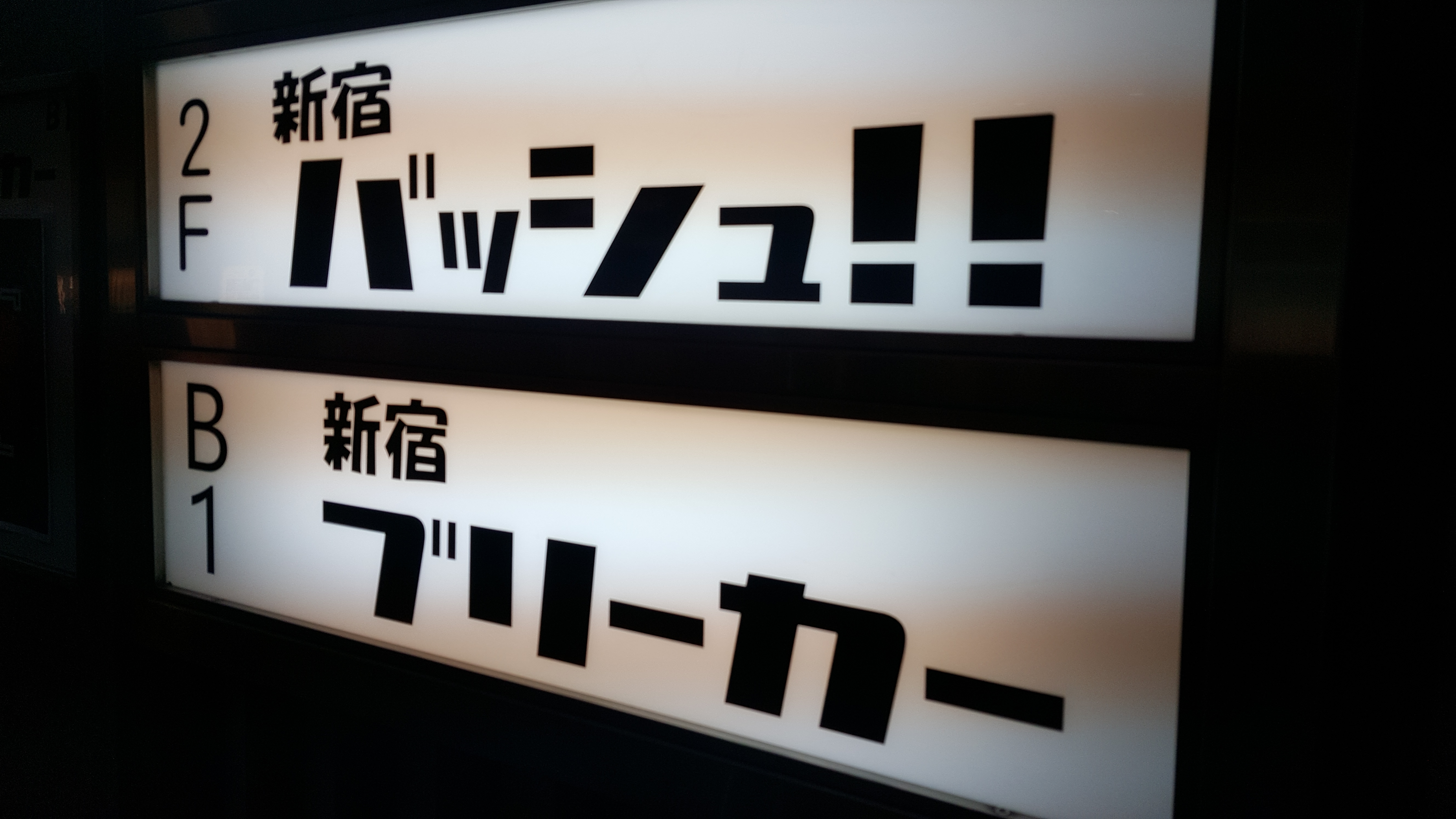 新宿バッシュ!!、新宿ブリーカーの看板